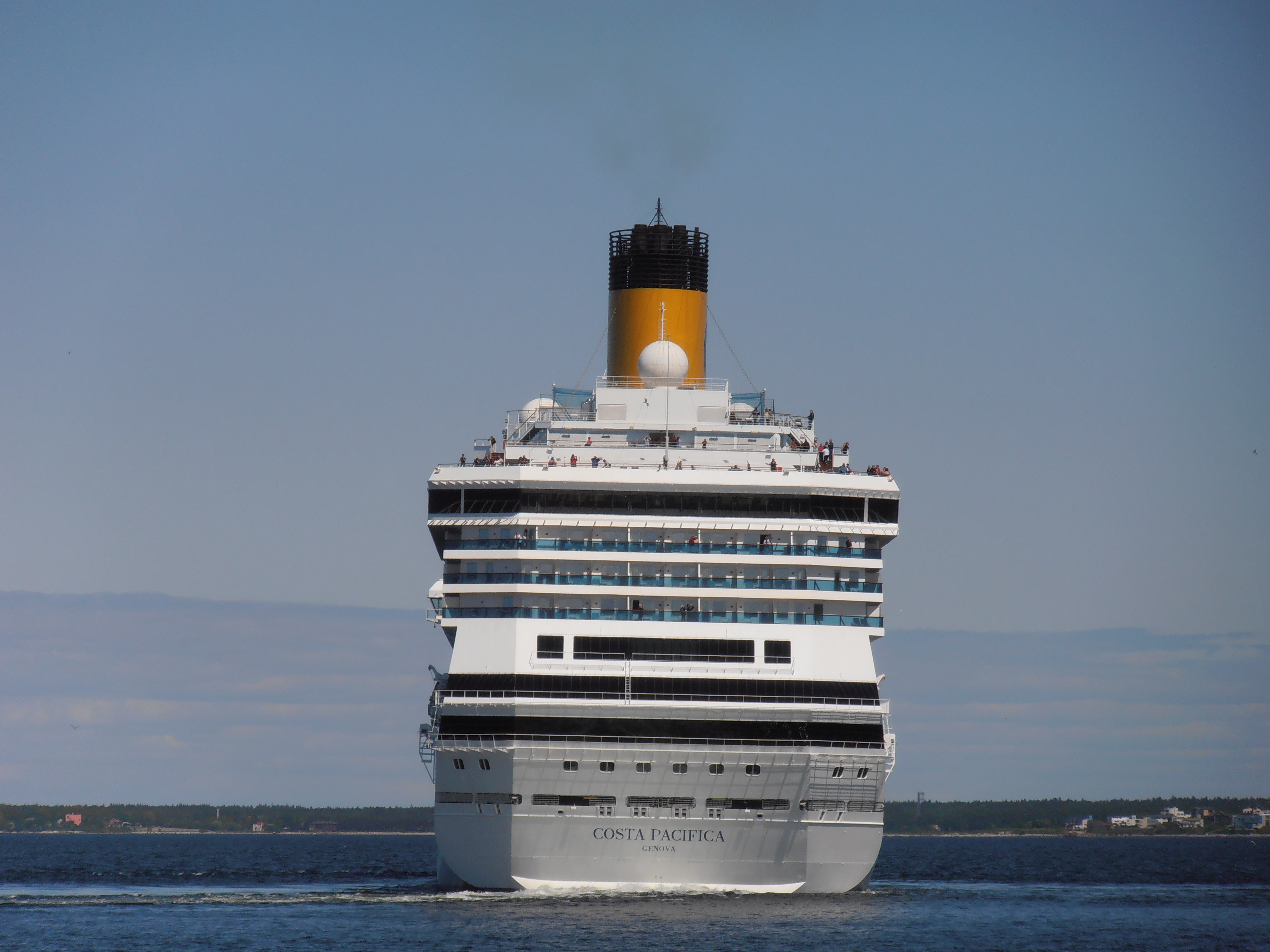 Costa Pacifica lahkub Tallinnast 29. mail 2012